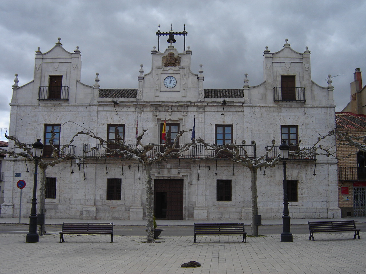 Fachada del Ayuntamiento de Nava del Rey (Valladolid)